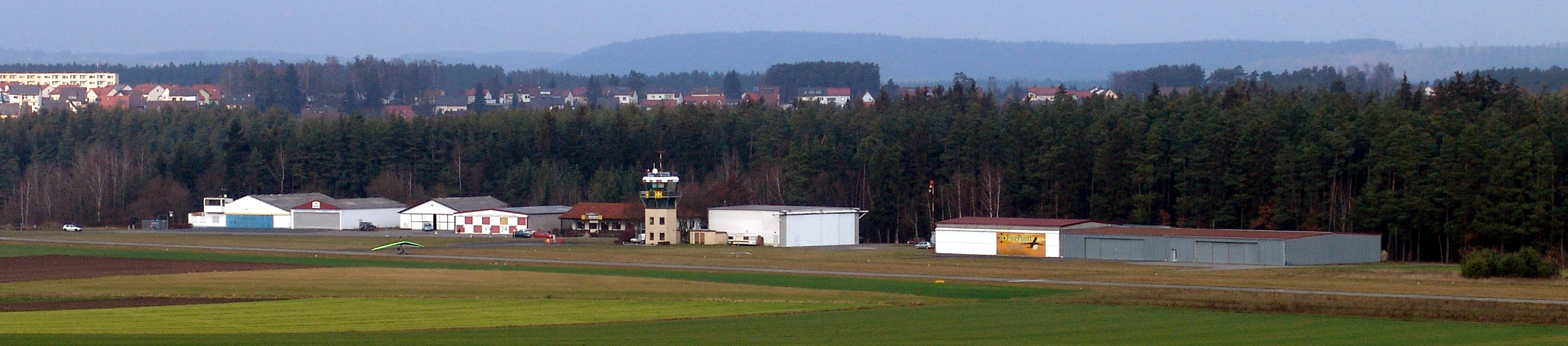 see Luftlandeplatz Weiden (EDQW)